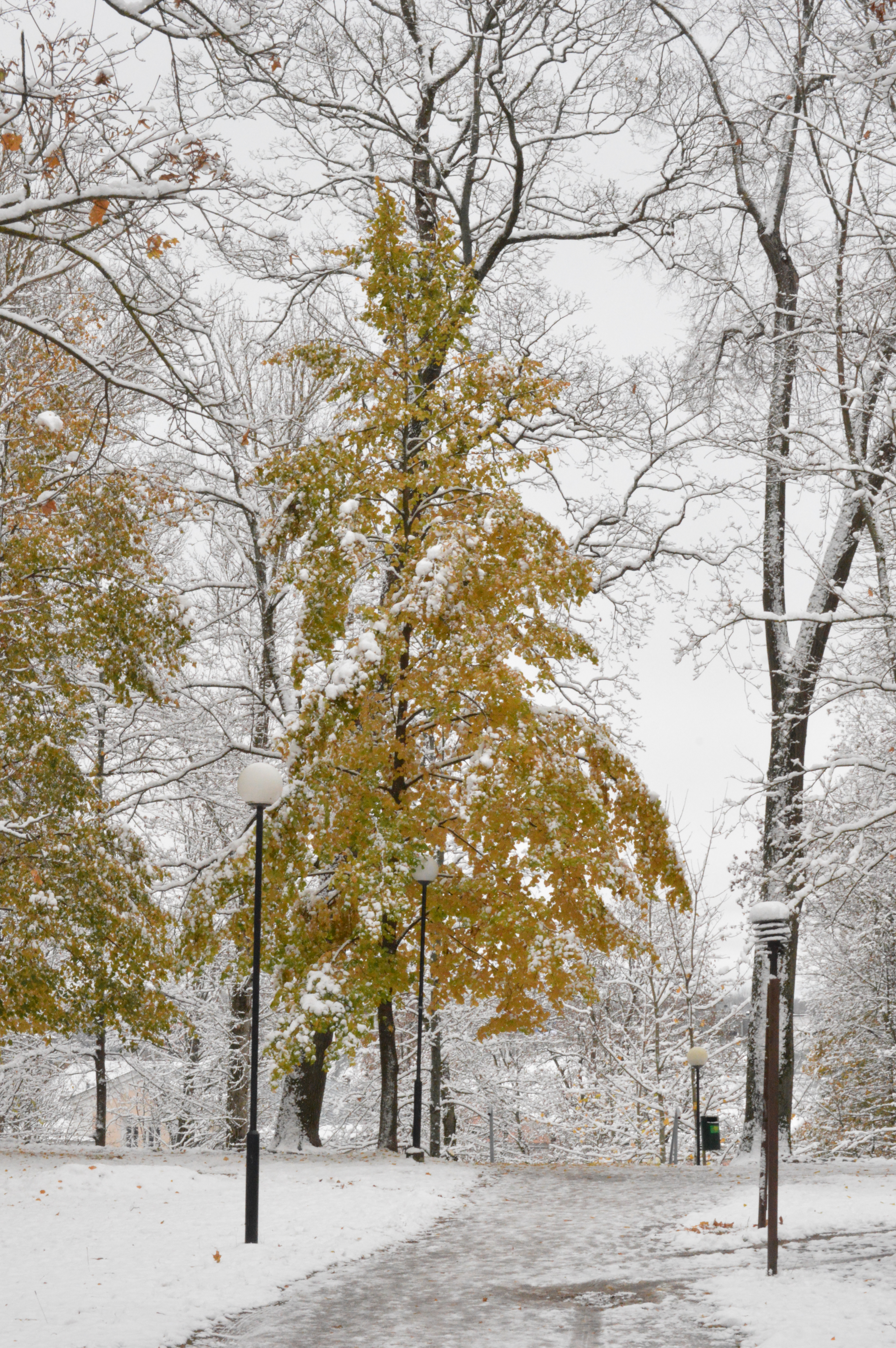 Toomemägi esimese lume ajal